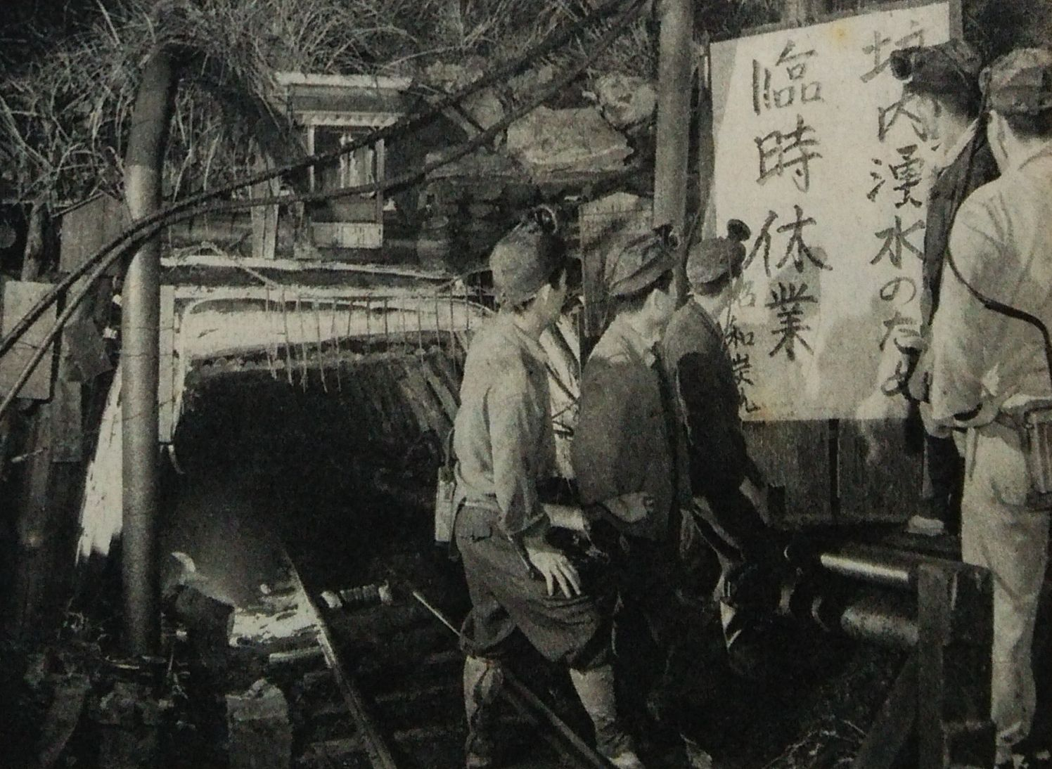 昭和28年西日本水害の際、坑内が冠水し操業不能となった筑豊炭田昭和炭鉱